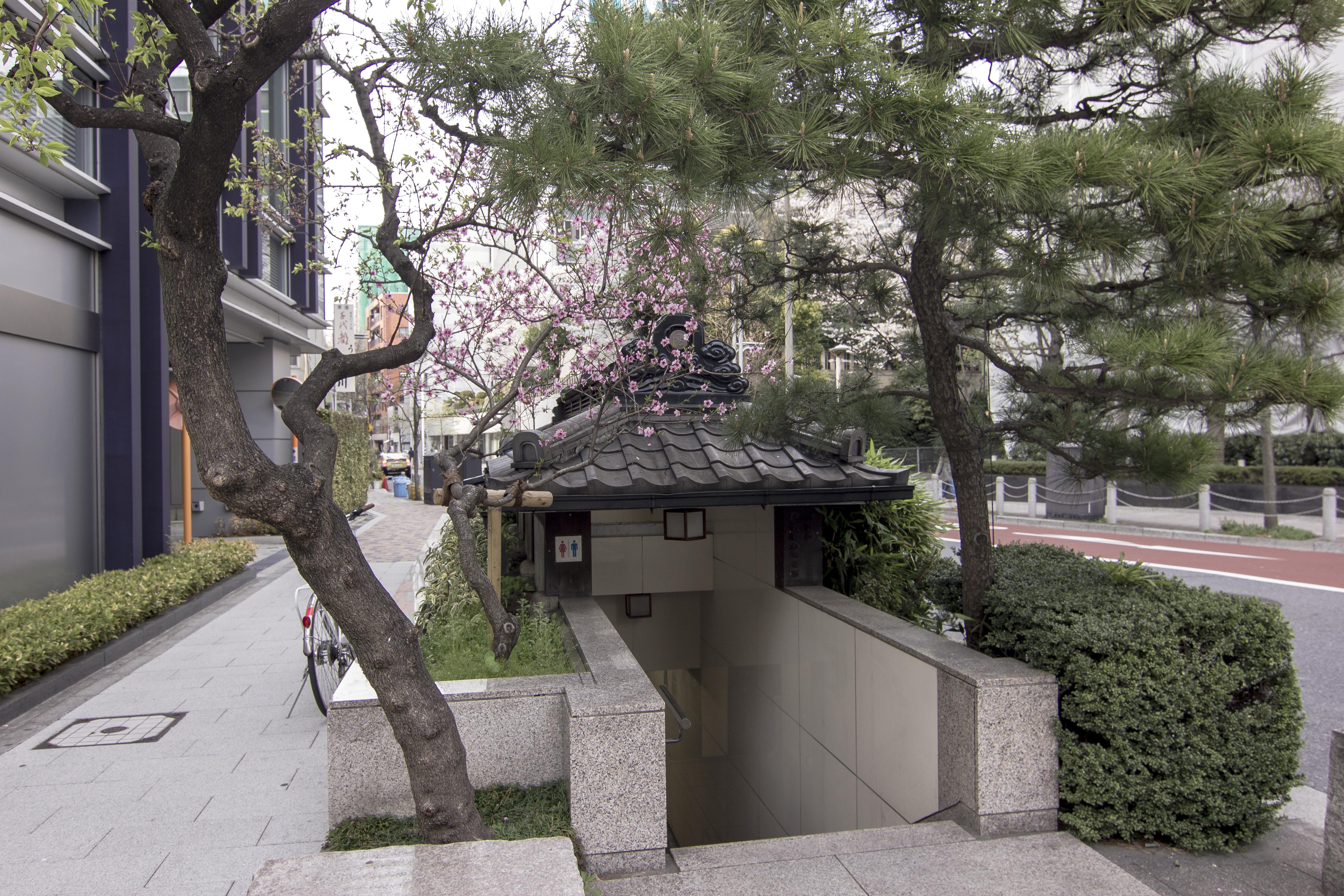 Hidden Toilets